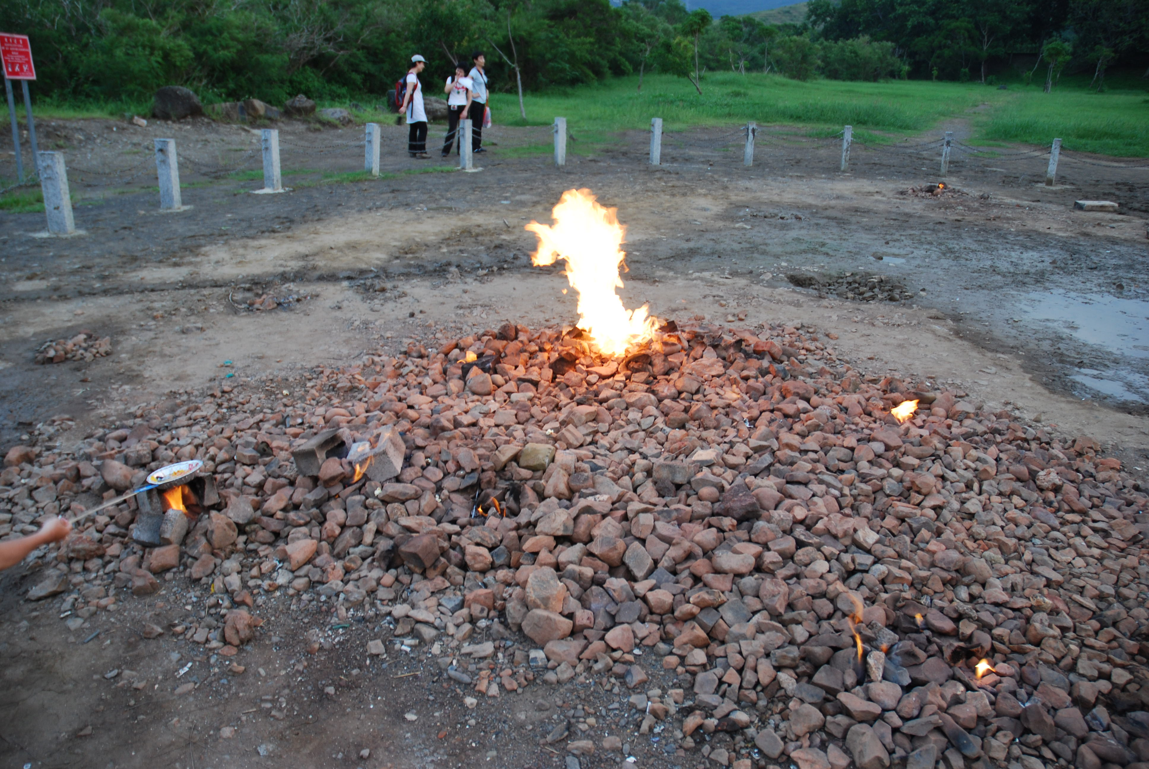 天然ガスが地面から出ており、火が付いているという観光地。中文（中国大陆）: 天然气从地表的裂隙窜出，点燃后成了著名的观光景点。